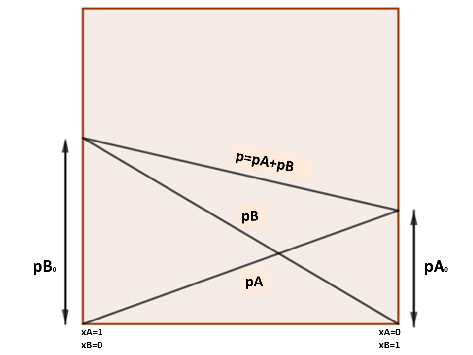 Зависност напона паре раствора